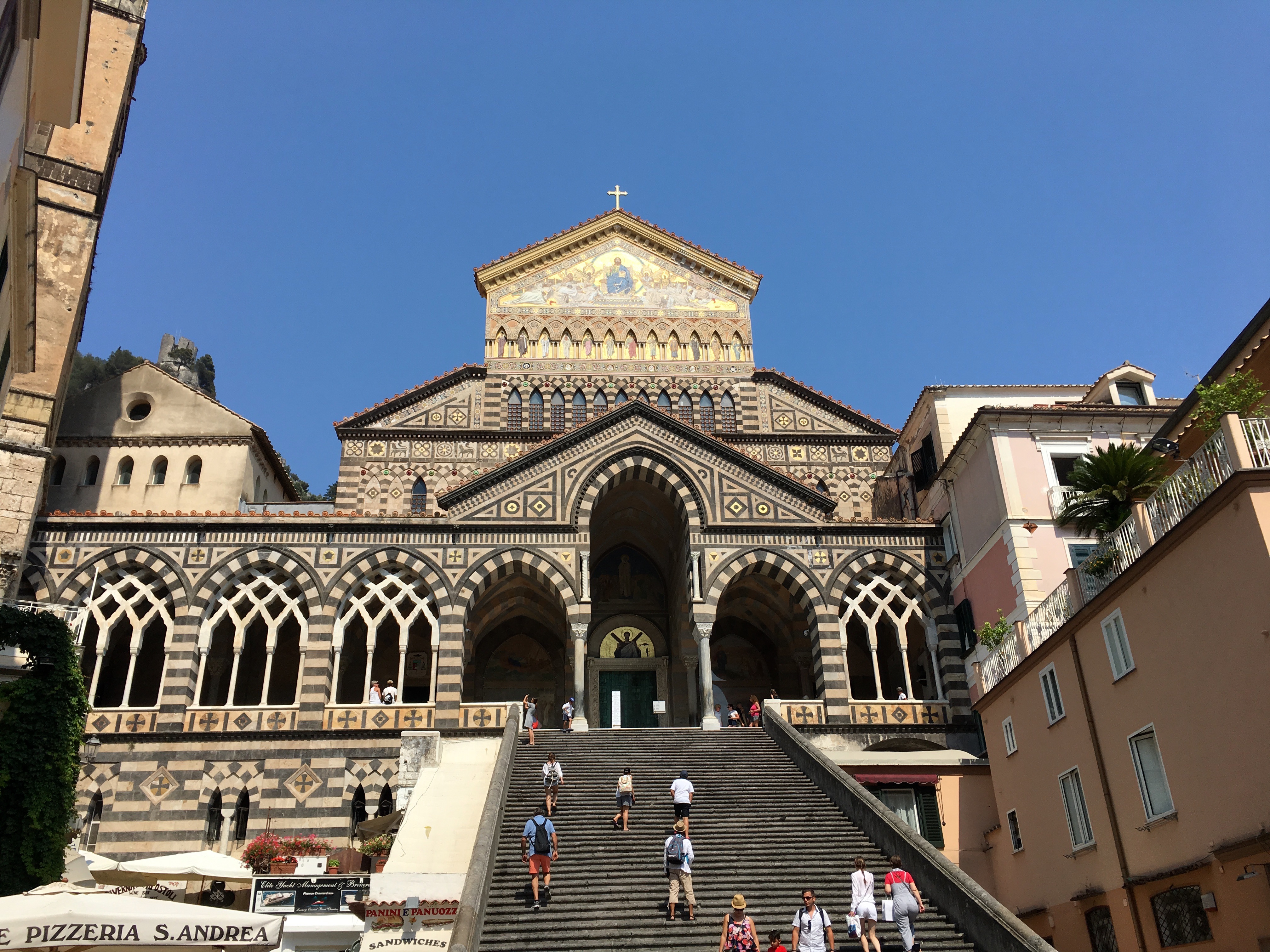 Exterior de la catedral de Amalfi.